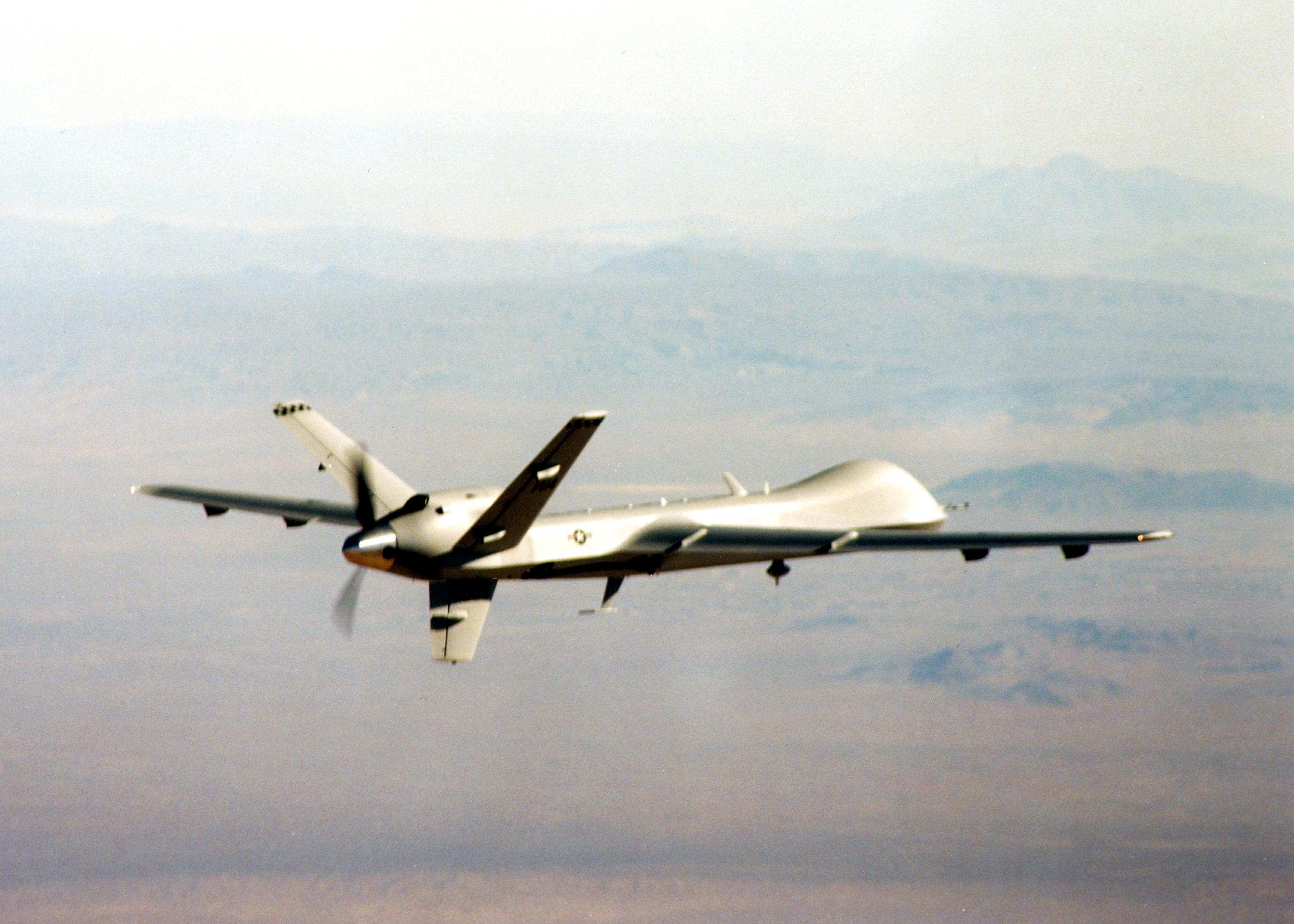 MQ-9 Reaper